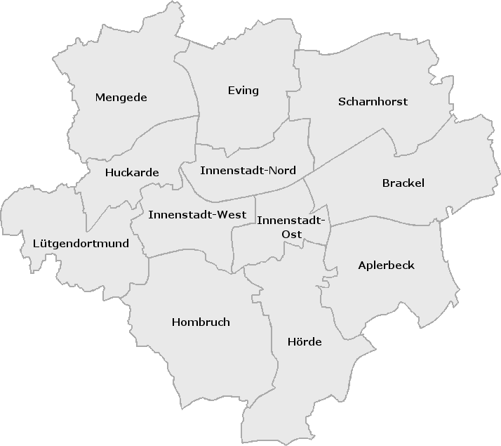 Umriss und Namen der Dortmunder Stadtbezirke.